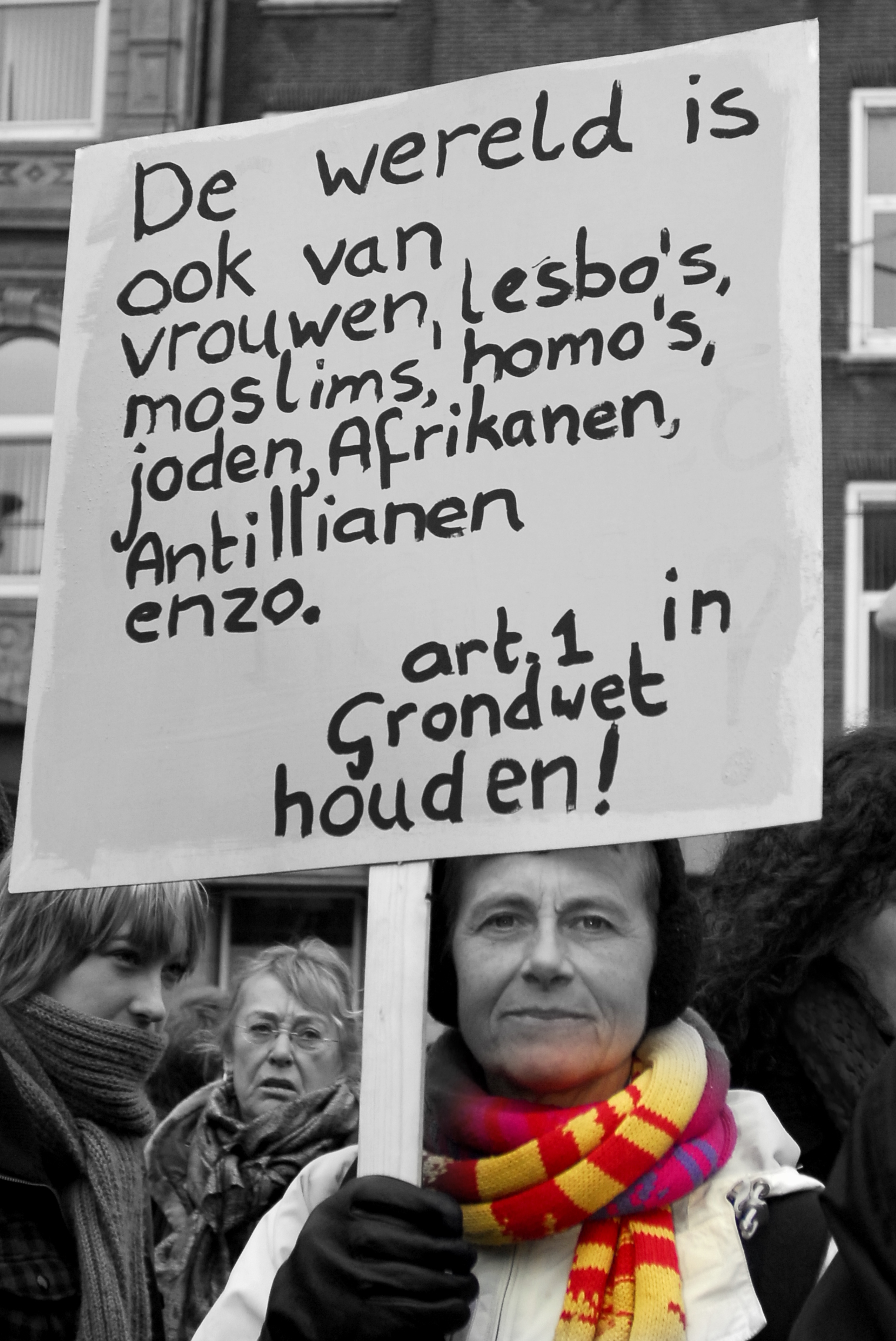 Nederland bekend kleur 2008, de Dam